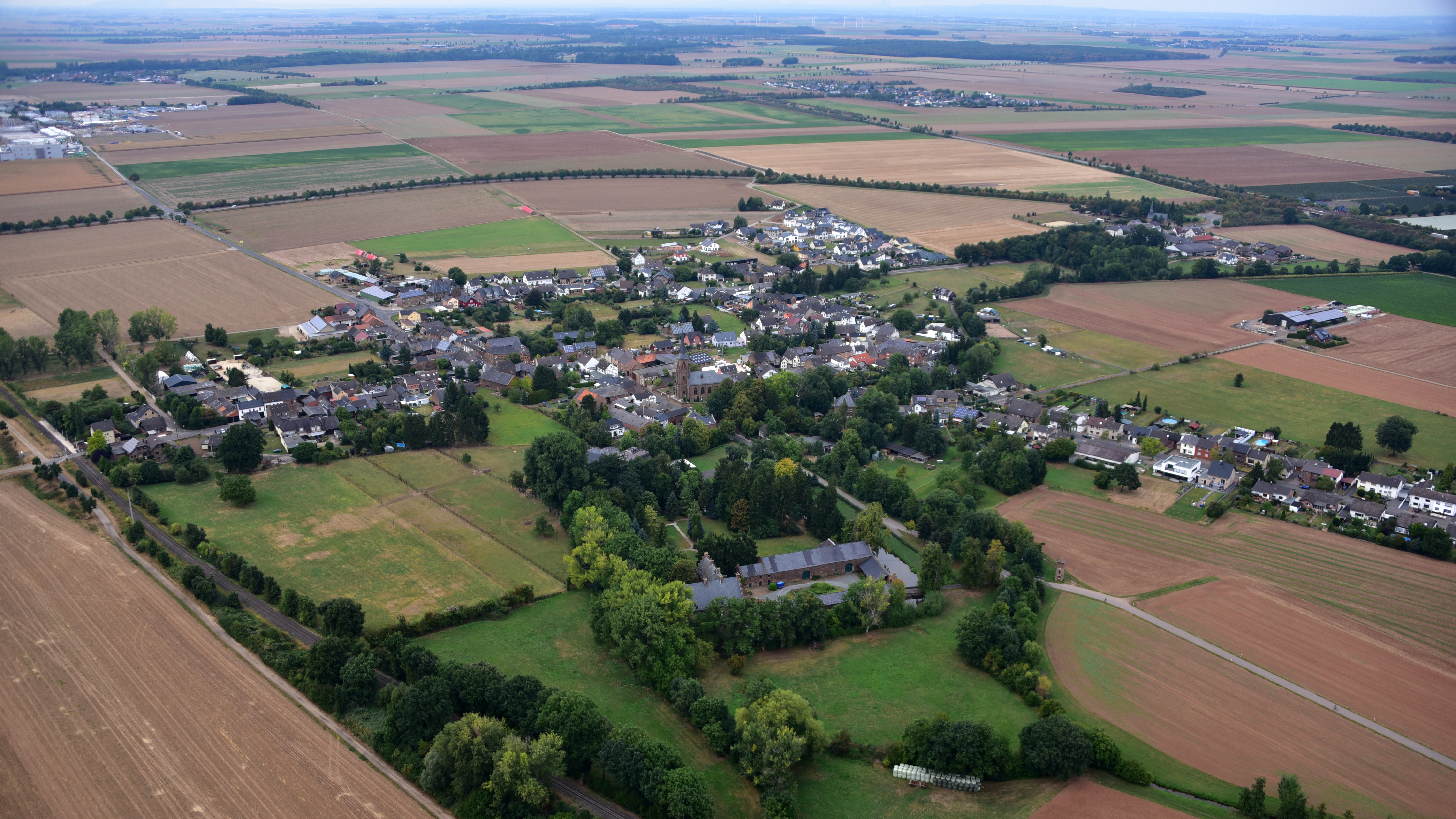 Nemmenich, Luftaufnahme (2016)